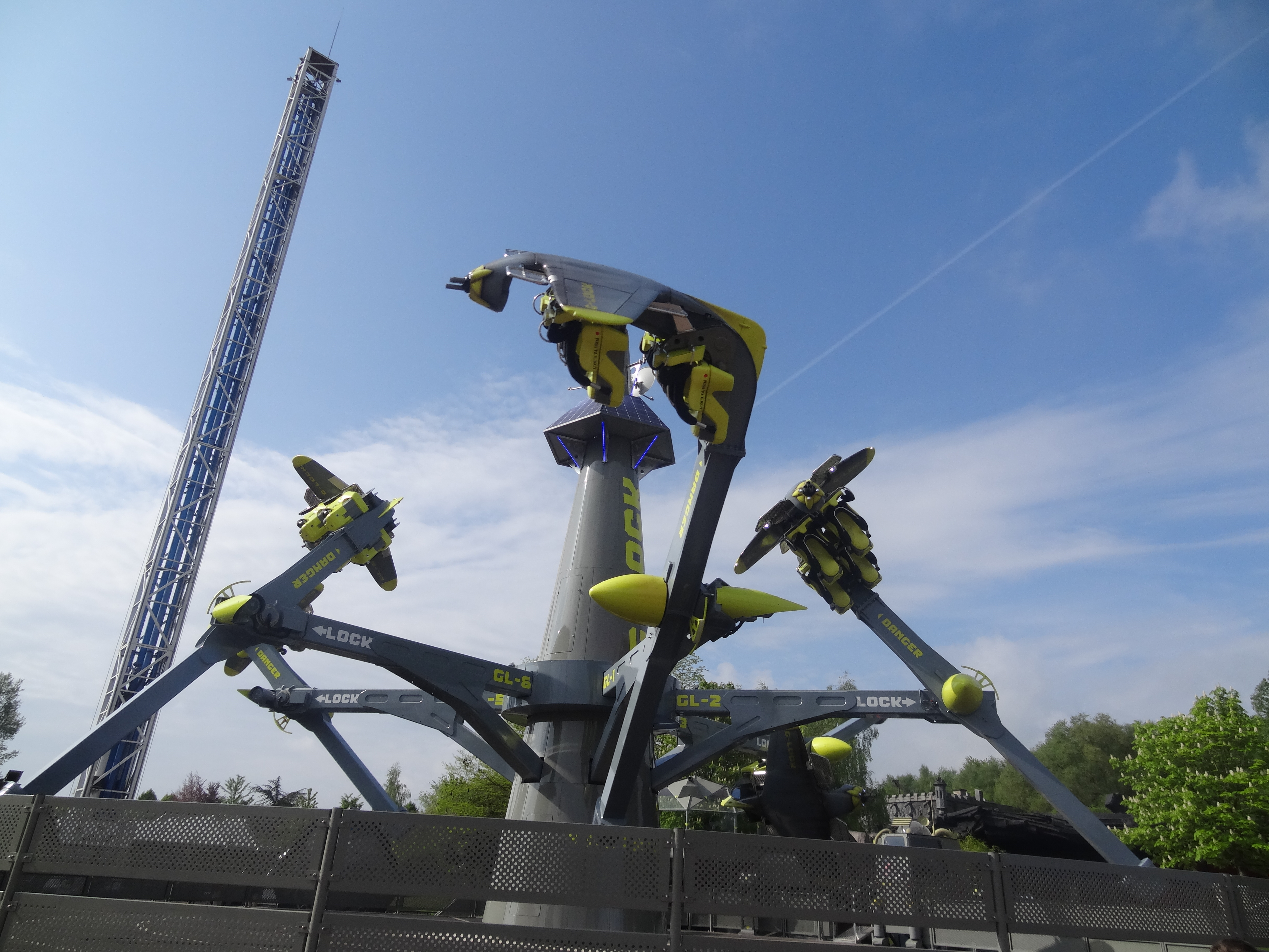 G-Lock à Walygator Parc